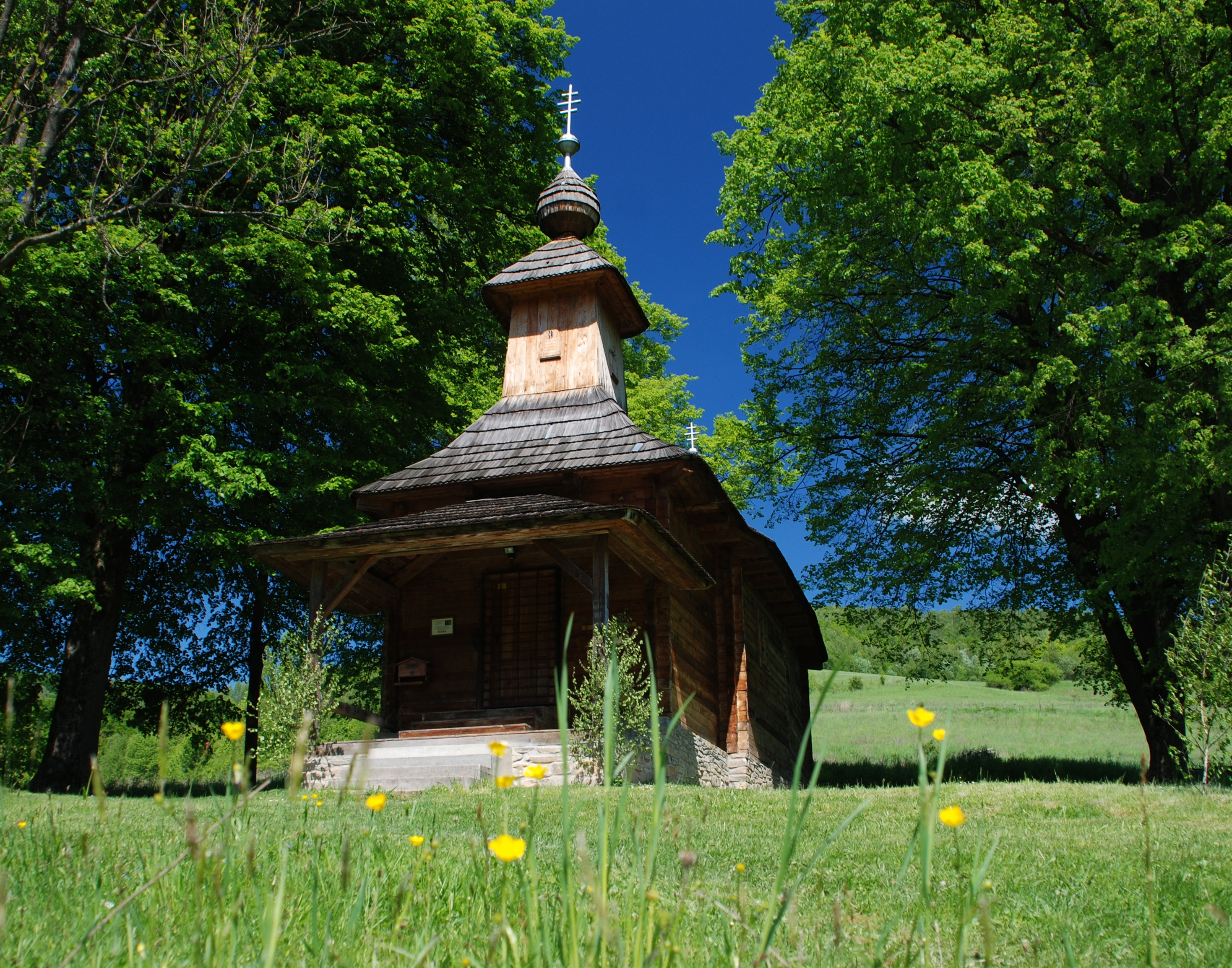 Jalova, kostol drevený